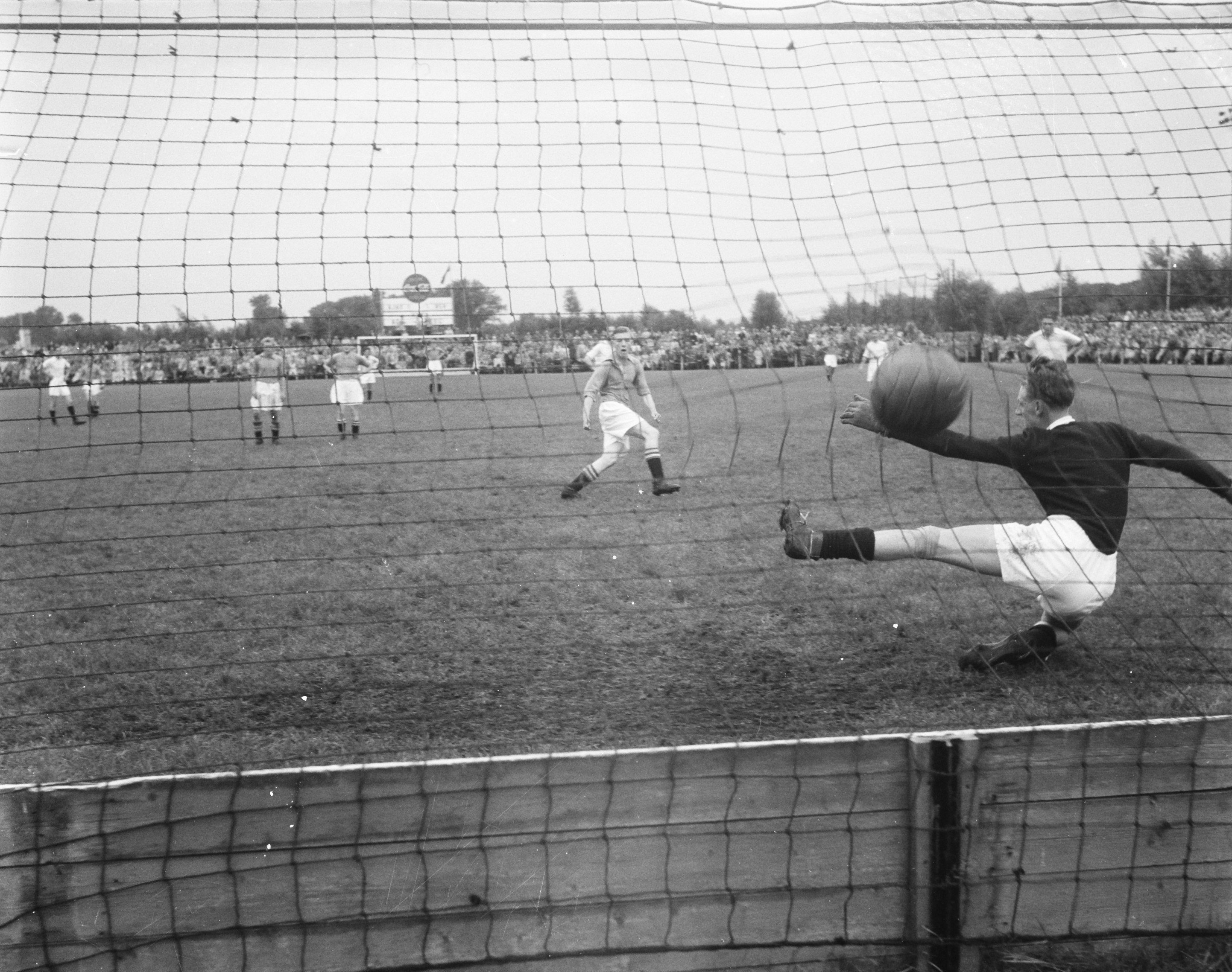 Collectie / Archief : Fotocollectie Anefo Reportage / Serie : [ onbekend ] Beschrijving : Arol-beker Ajax tegen VSV Datum : 26 augustus 1951 Instellingsnaam : AJAX Fotograaf : Noske, J.D. / Anefo Auteursrechthebbende : Nationaal Archief Materiaalsoort : Negatief (zwart/wit) Nummer archiefinventaris : bekijk toegang 2.24.01.03 Bestanddeelnummer : 904-7355